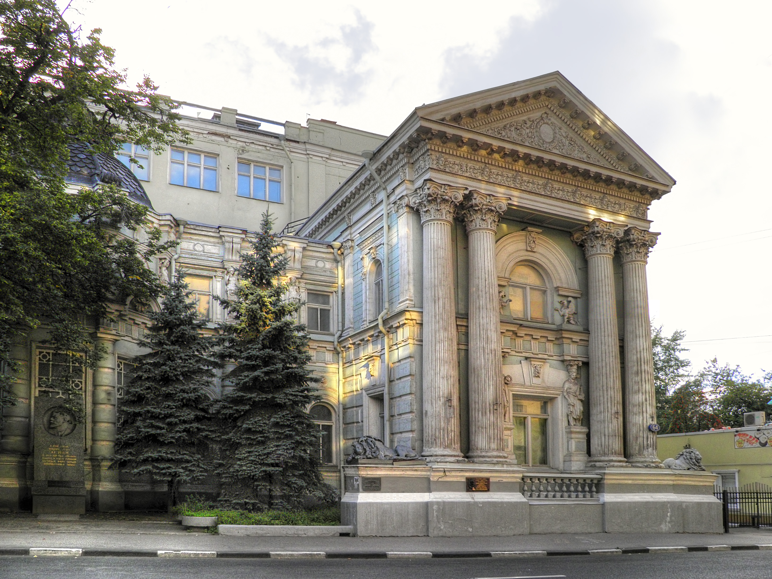 Усадьба фон Рекк: Пятницкая ул., дом 64, строение 1, Замоскворечье, Центральный округ, Москва